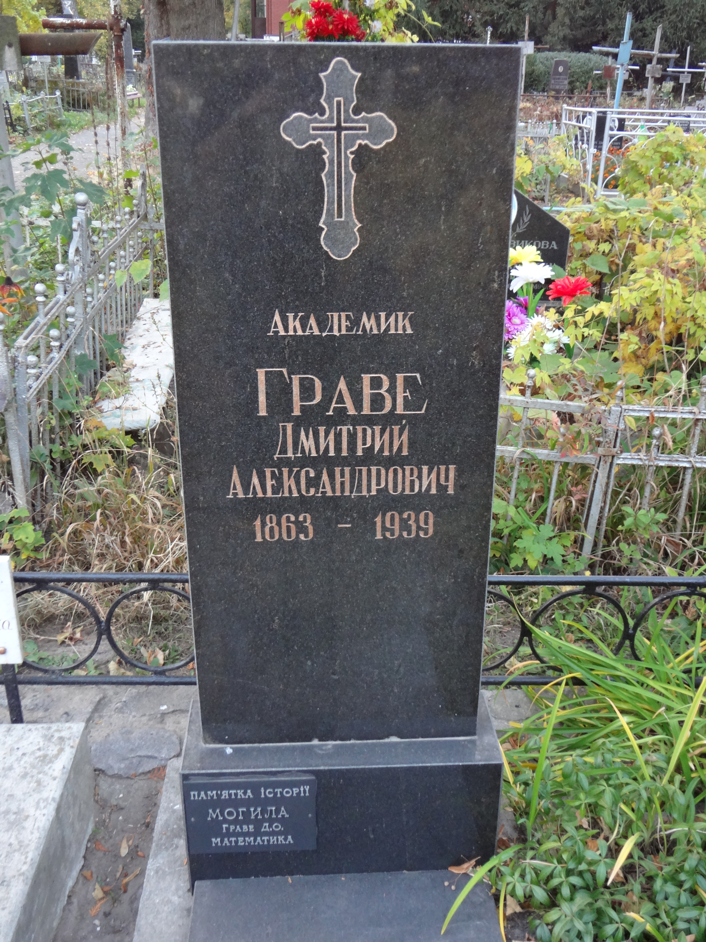 Могила Граве Д. О., математика, академіка АН України, Київ, Дорогожицька вул., 7